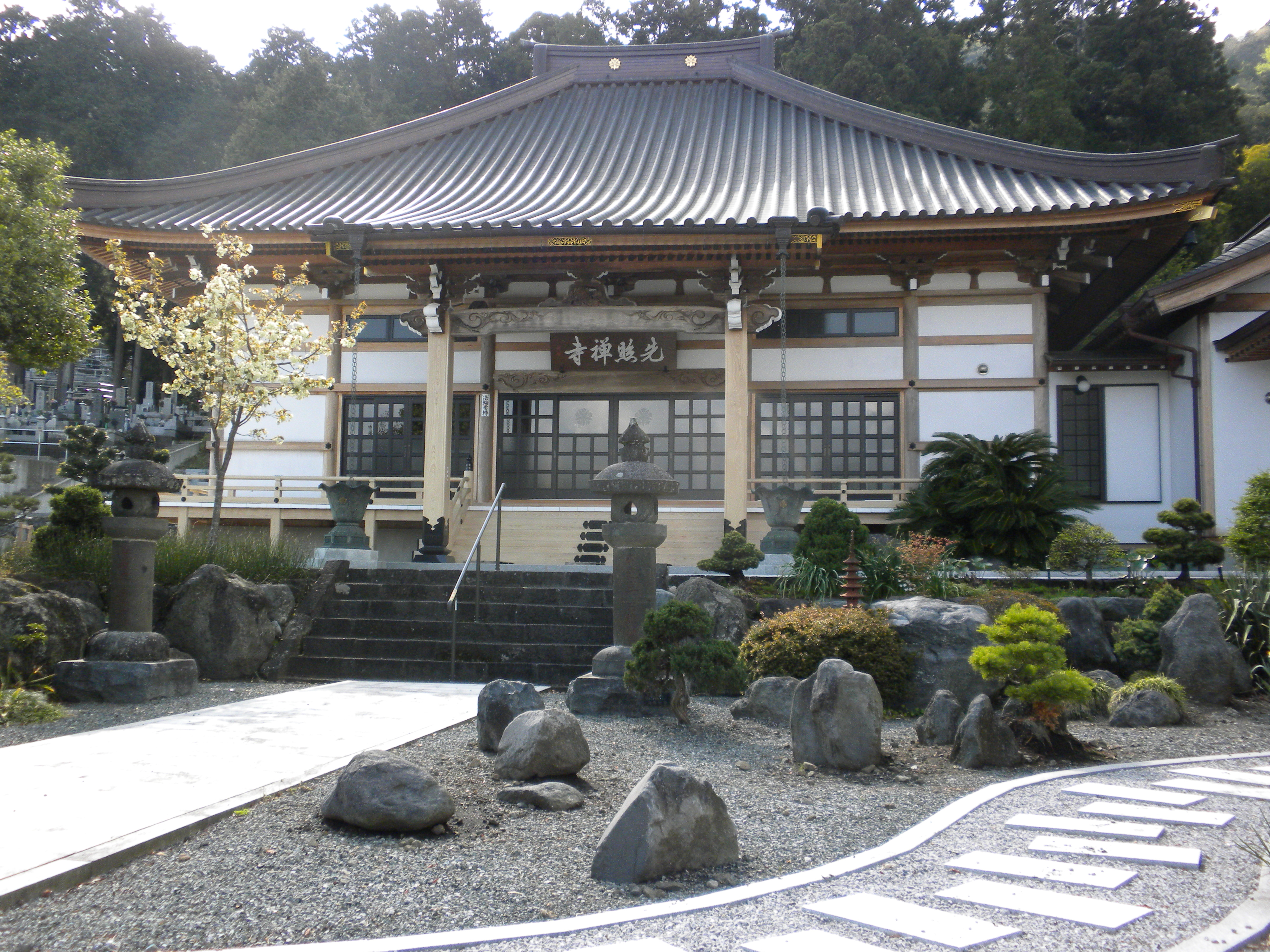 先照寺の境内